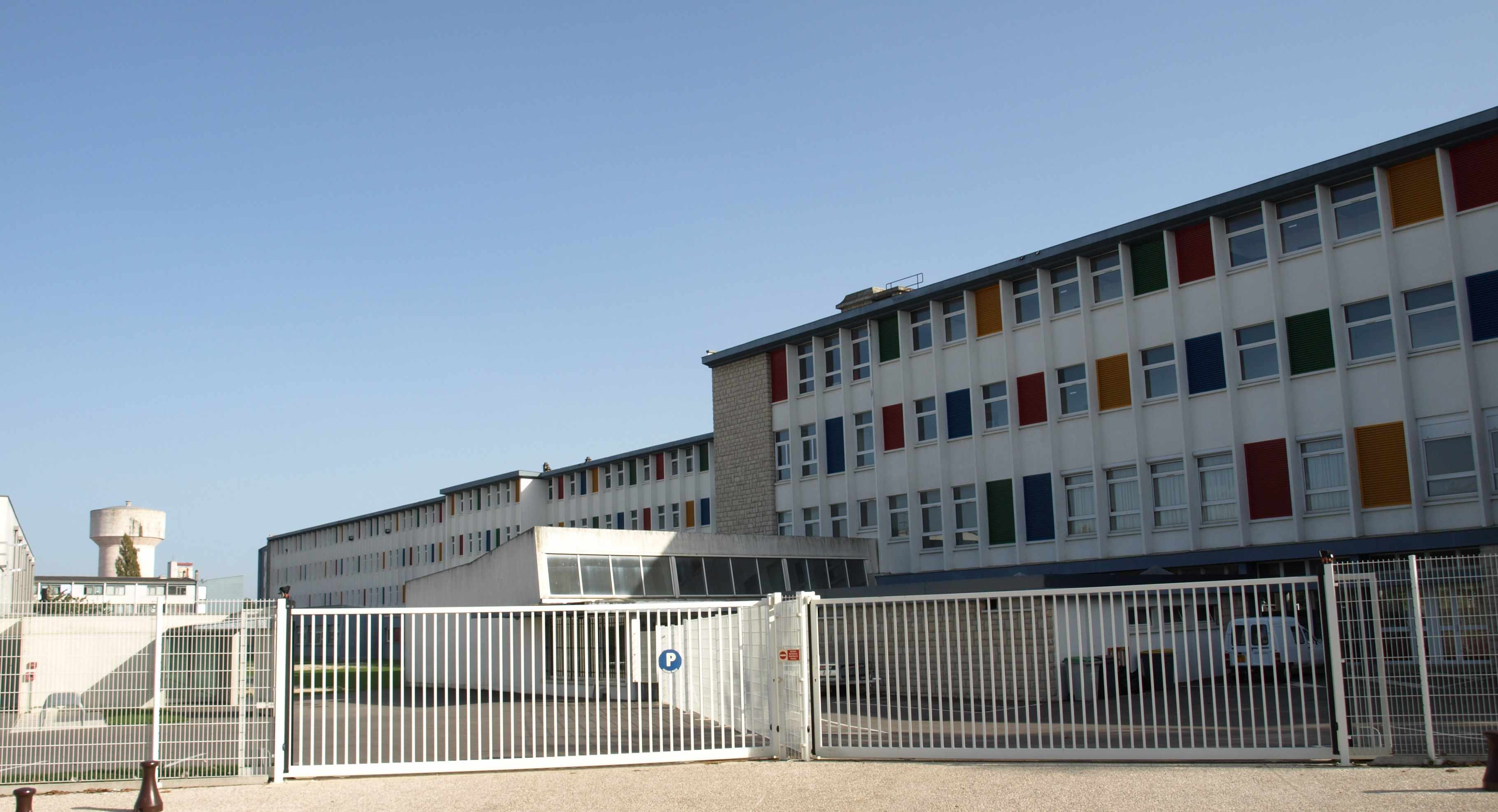 Vitry-le-François (51300 - FRANCE) : photographies Cité scolaire François Ier (bâtiments)